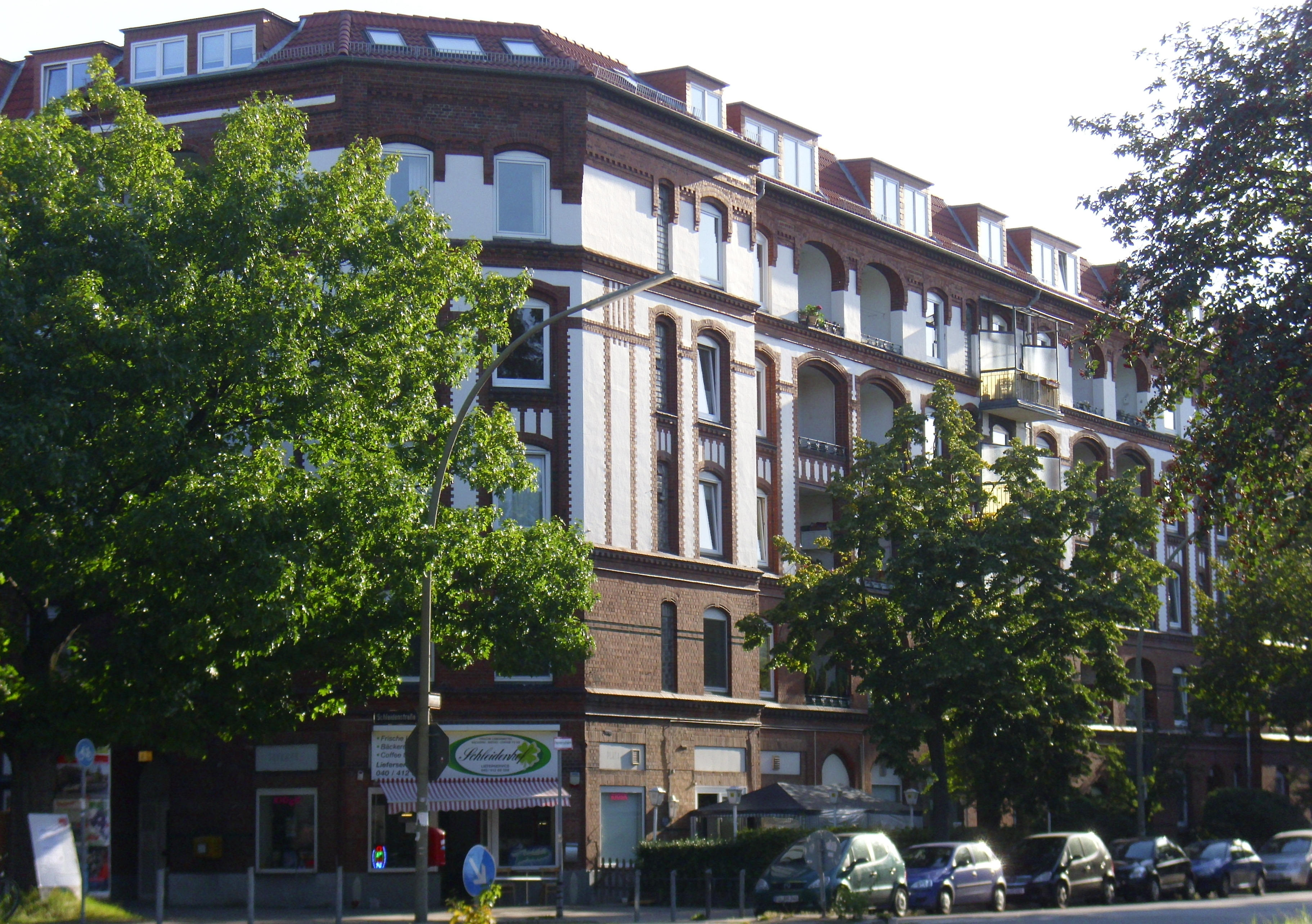 Schleidenhof - Lohkoppelstraße 46-54This is a photograph of an architectural monument.